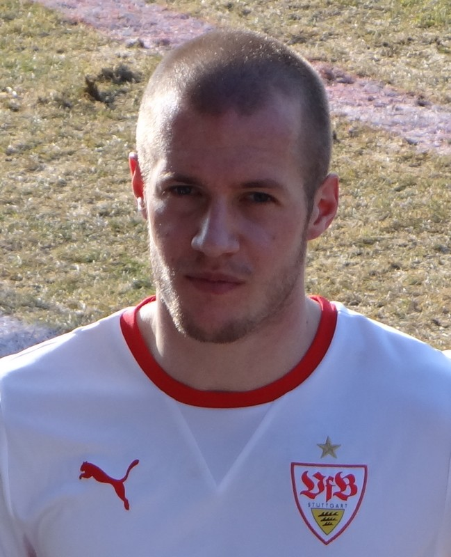 Sebastian Enderle nach dem Spiel VfB II gegen Kickers Offenbach. Aufgenommen von